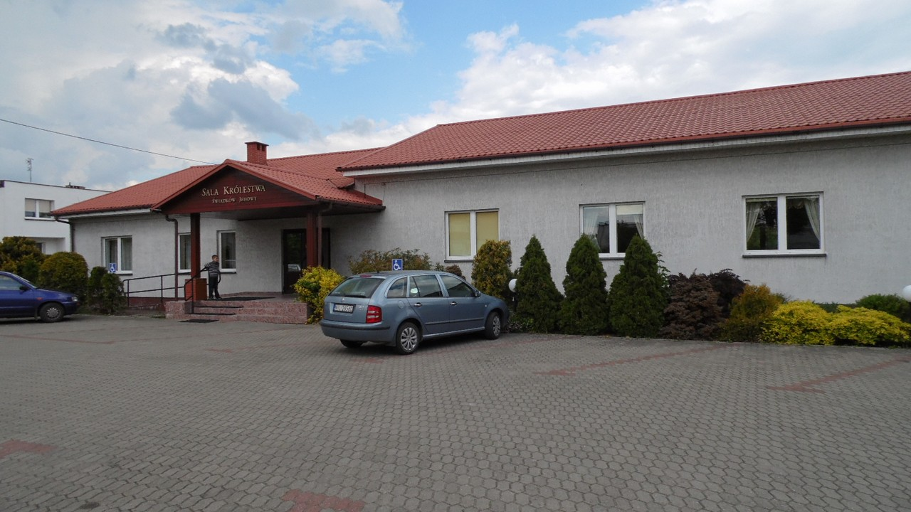 SALA KRÓLESTWA ŚWIADKÓW JEHOWY.